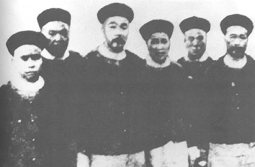 中文（中国大陆）: 清驻藏大臣有泰(左三)和他的幕僚